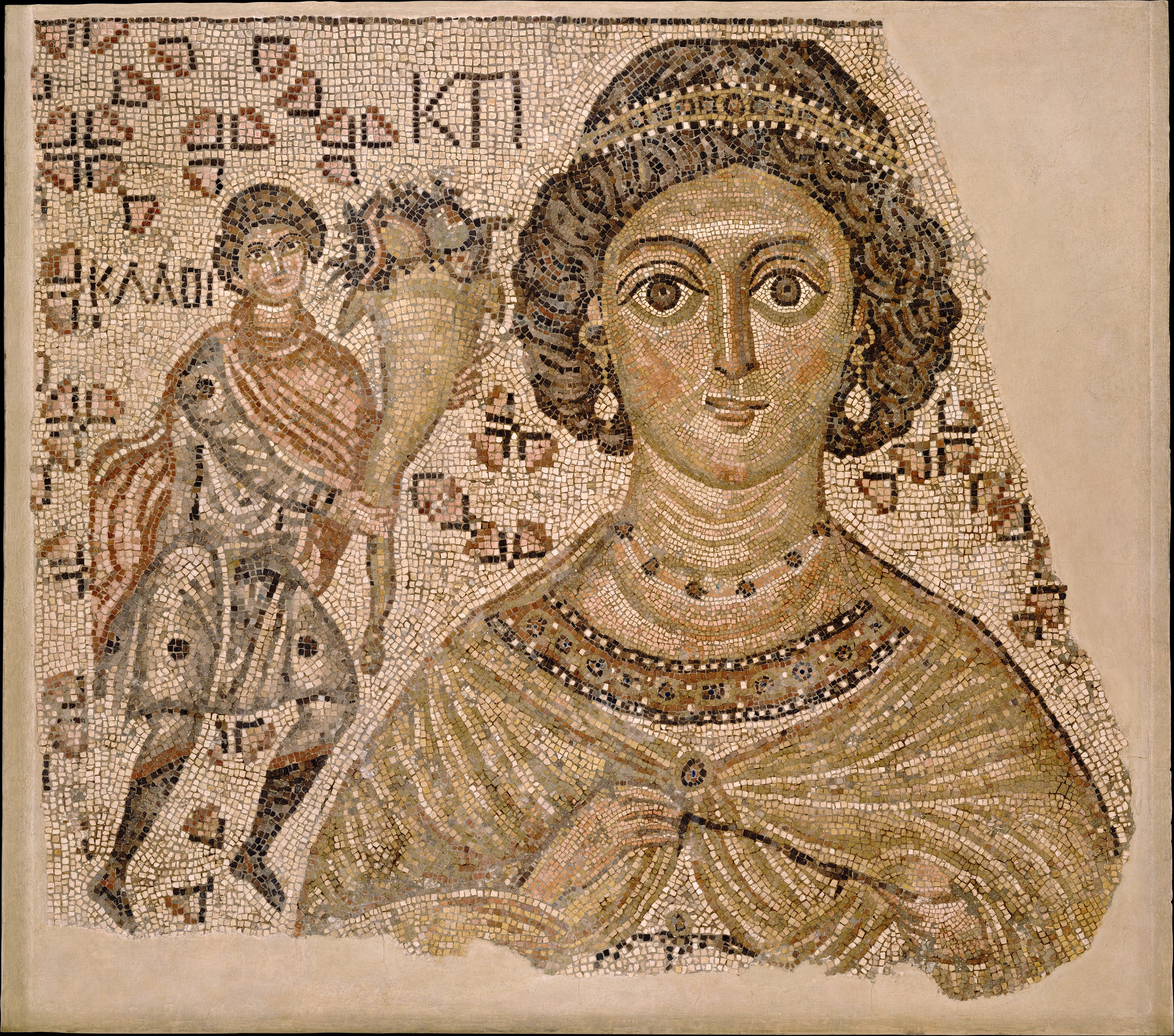 Byzantine; Mosaic fragment; Mosaics